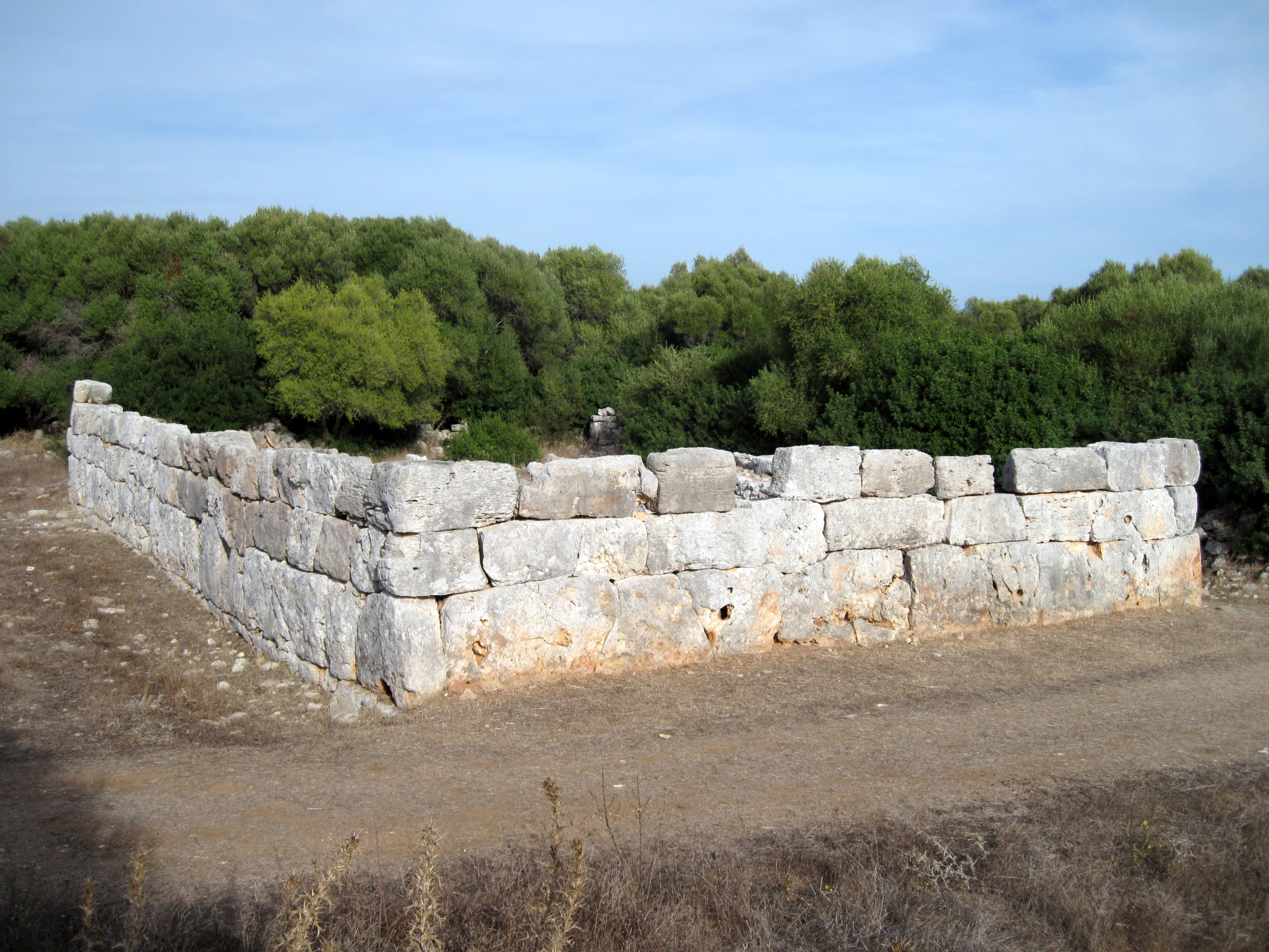 Gebäuderreste im talaiotischen Dorf von S’Hospitalet Vell, einer Ausgrabungsstätte in der Gemeinde Manacor, Mallorca, Spanien